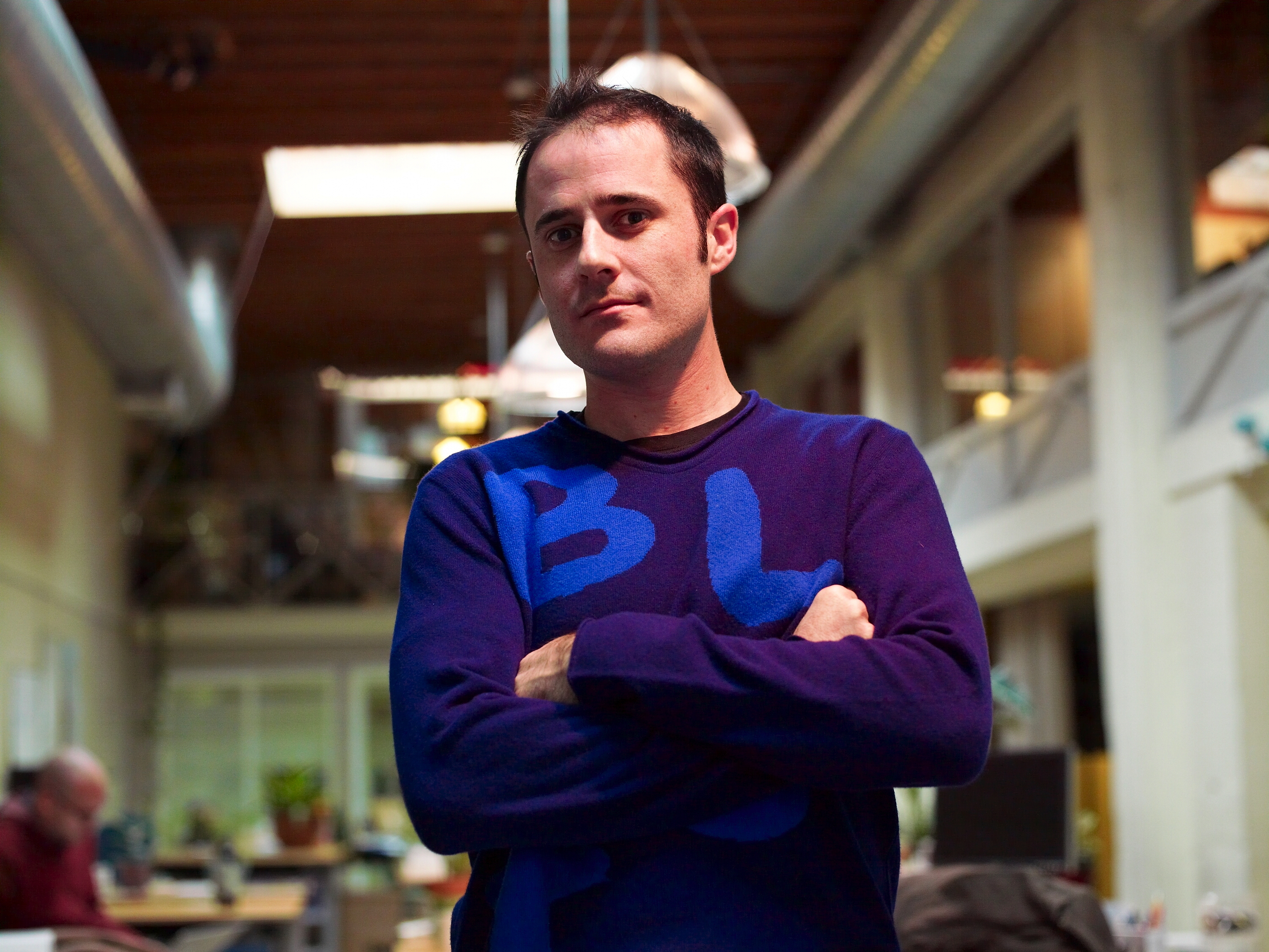 American blogger and entrepreneur Evan Williams.